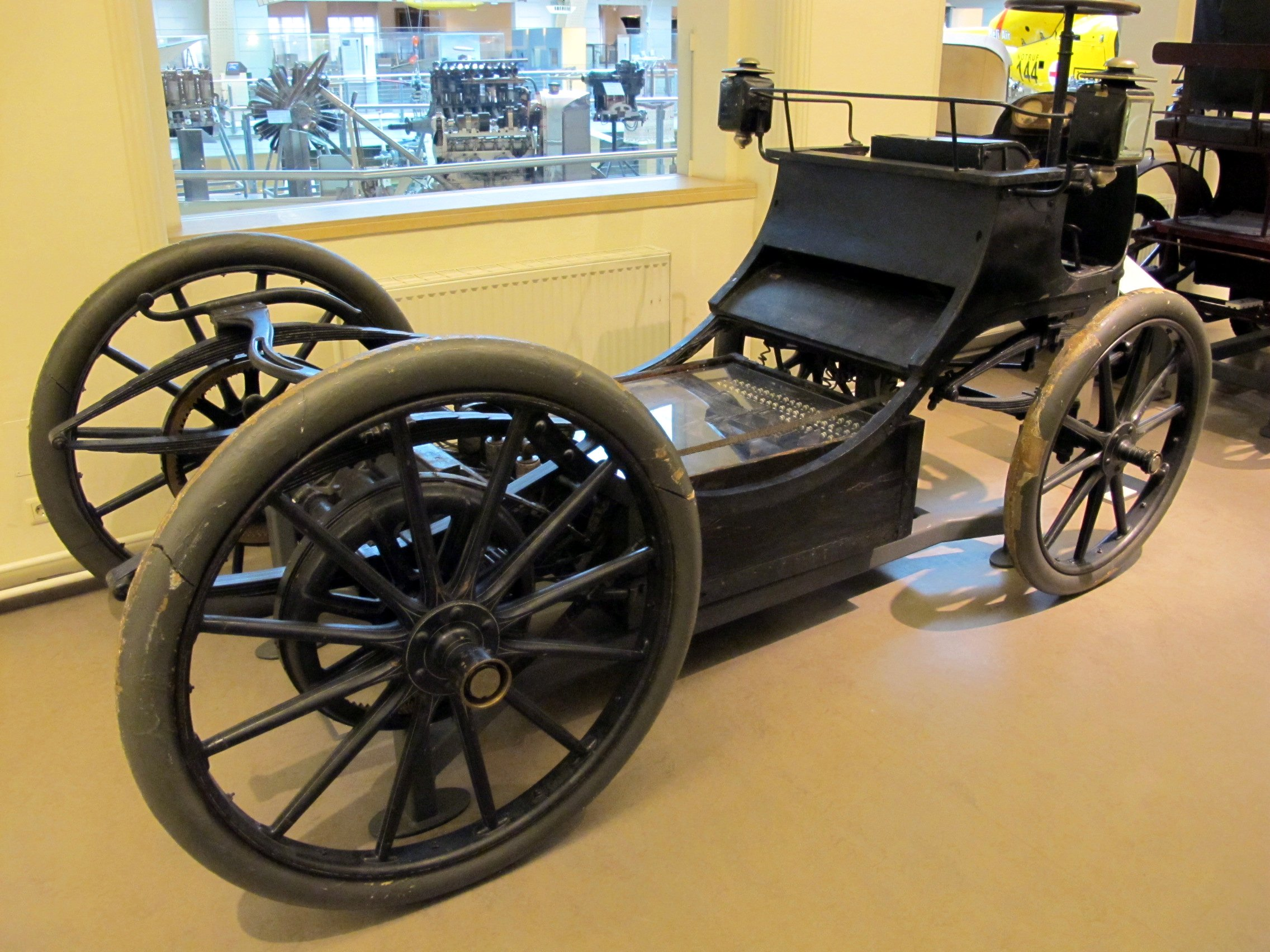 Egger-Lohner-Elektromobil. Erhielt auf der Berliner Automobilausstellung 1899 die Goldene Medaille und bei einer Konkurrenzfahrt für Elektrofahrzeuge den ersten Ehrenpreis. Der Antrieb erfolgt über Zahnräder auf die Hinterräder des Wagens. Nach 4 Stunden Ladezeit kann der 1450 kg schwere Wagen mit einer Maximalgeschwindigkeit von 35 km/h eine Strecke von ca. 80 km zurück legen. Auf den Hinterrädern ist zusätzlich eine Widerstandsbremse eingebaut. Hersteller: Egger-Lohner-Elektromobil Baujahr: 1899